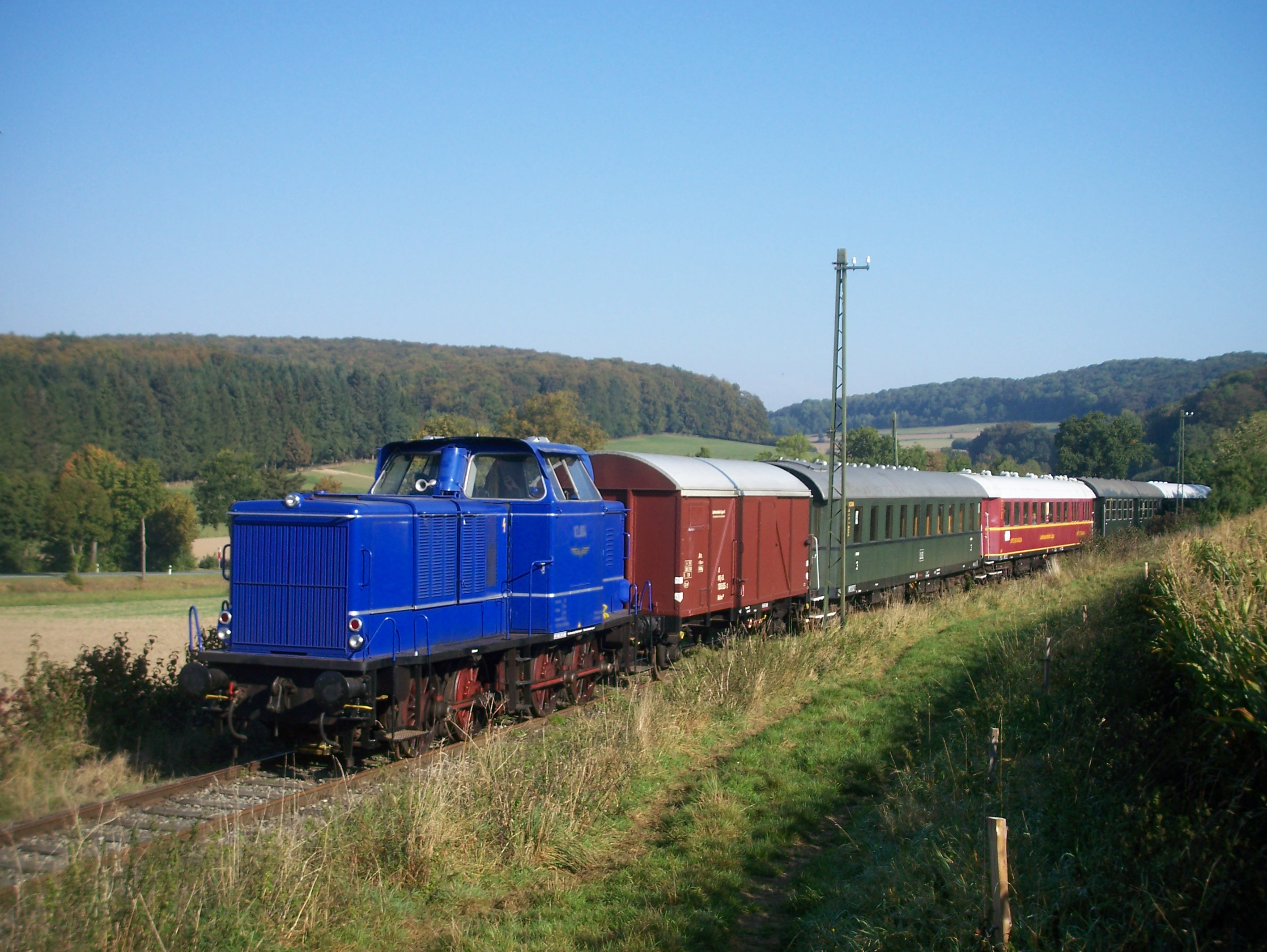 Zug der Landeseisenbahn Lippe, bei Herborn (Barntrup)